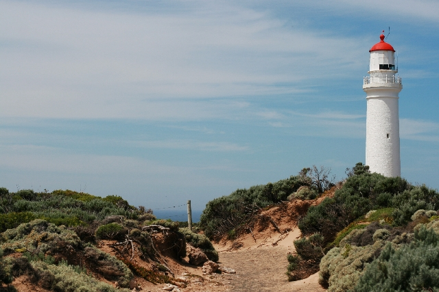 IMG_5114Vilagitotony_opt